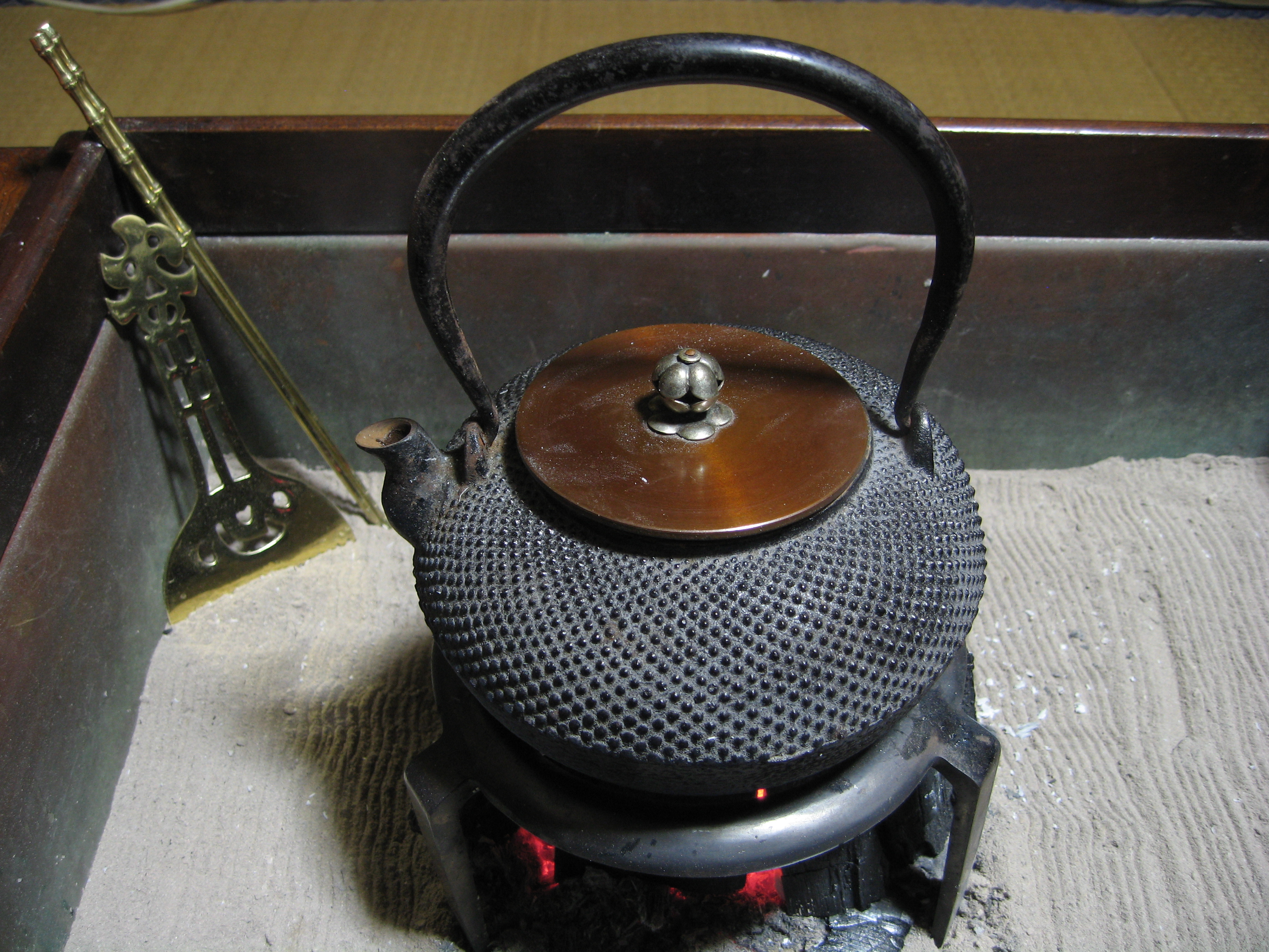 日本の火鉢の中の鉄瓶